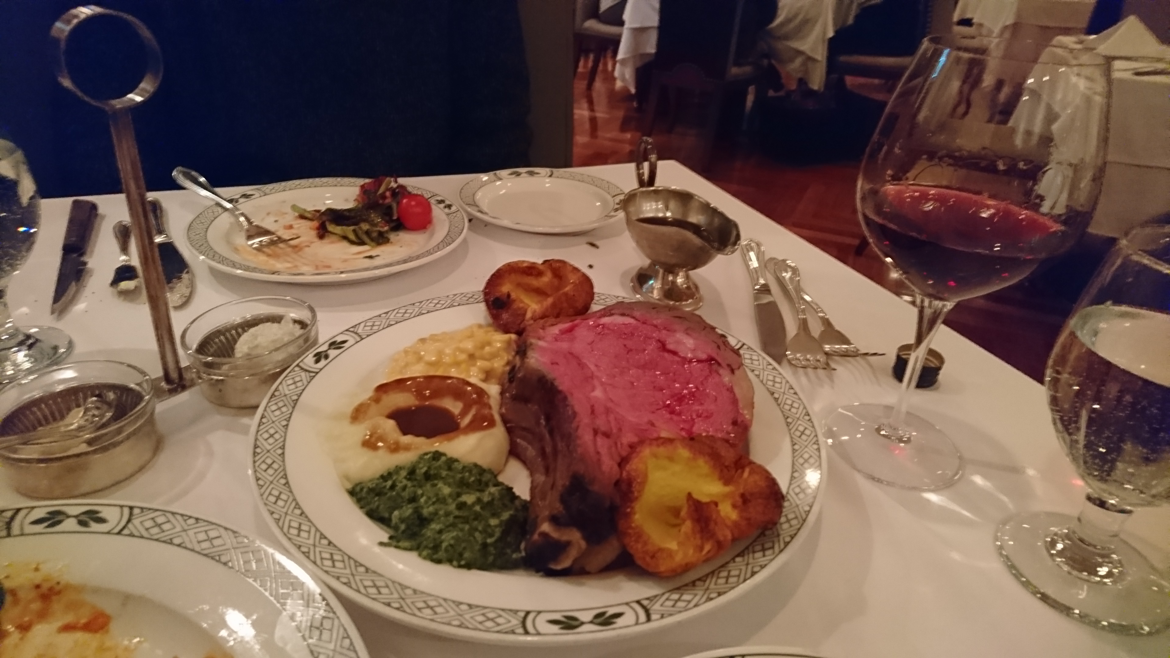 와인과 페어링되는 음식